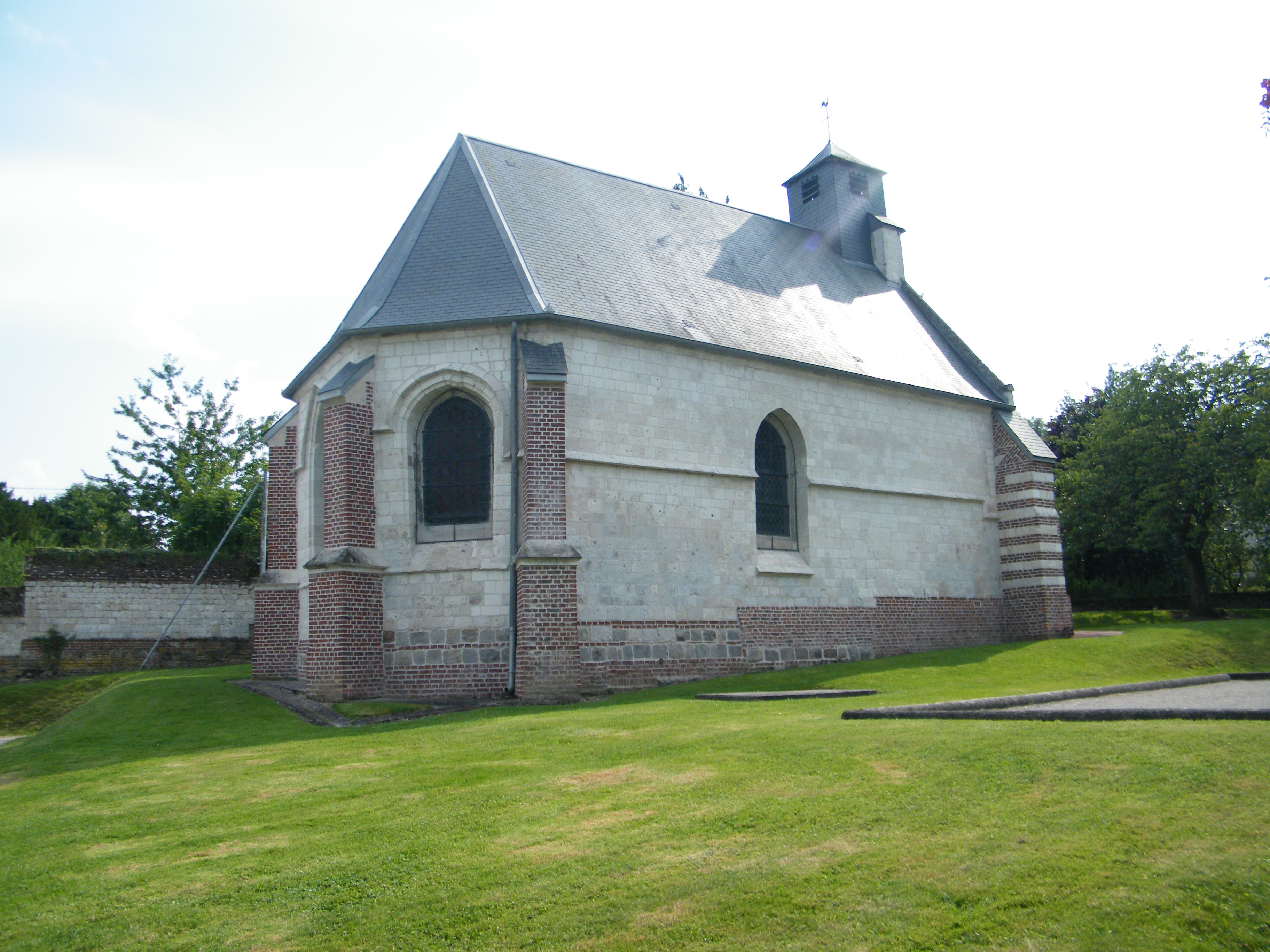 église.